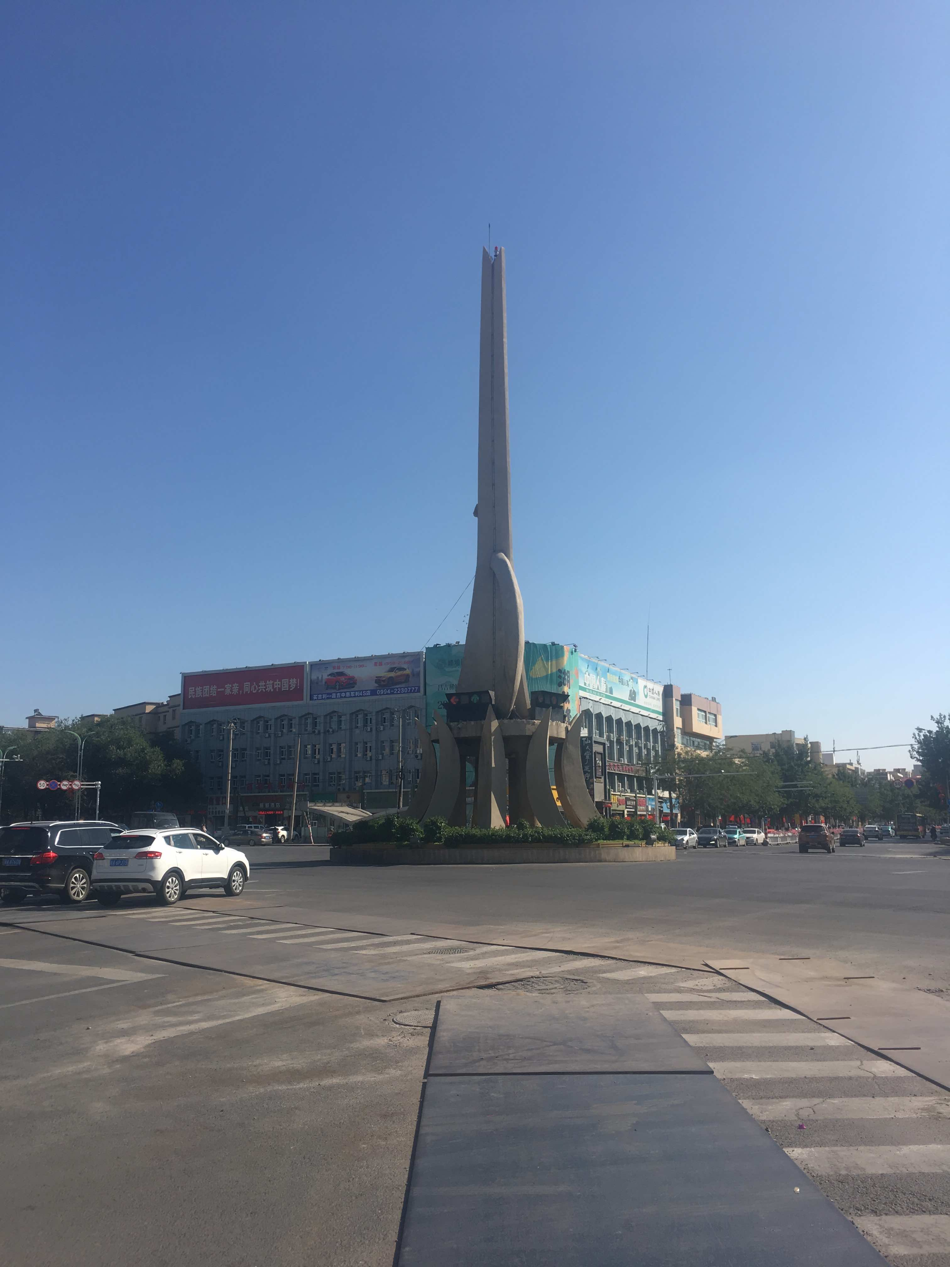 昌吉市中心，飞马环岛